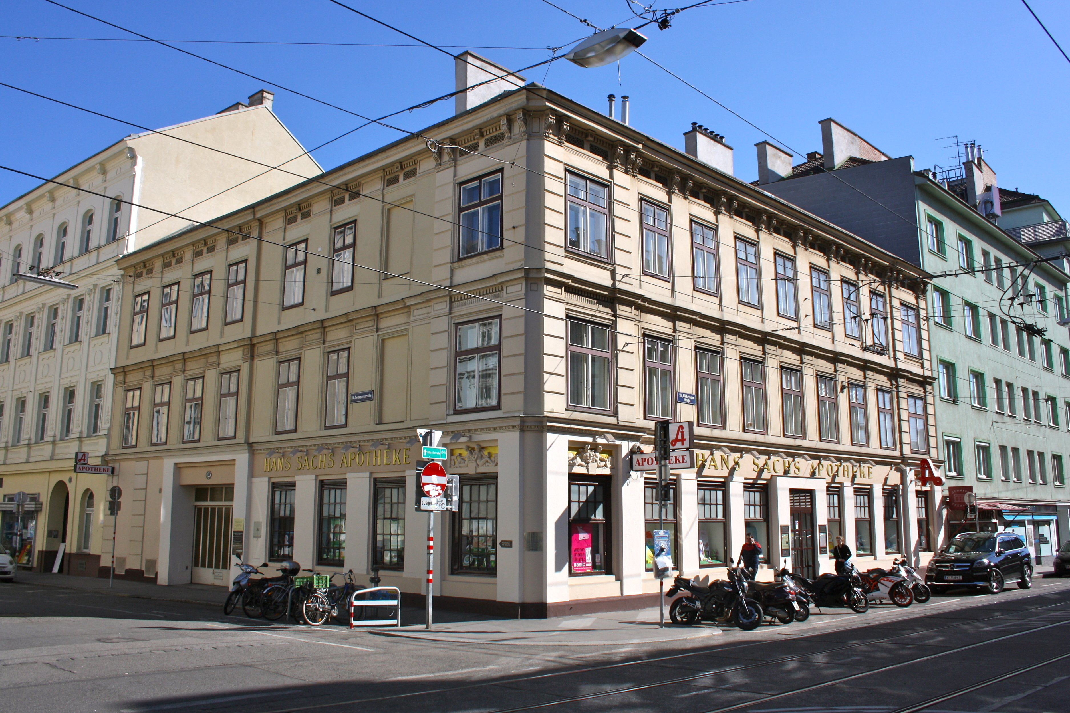 Wohn- und Geschäftshaus Währinger Straße 84 / Semperstraße 18A, Wien-Währing.